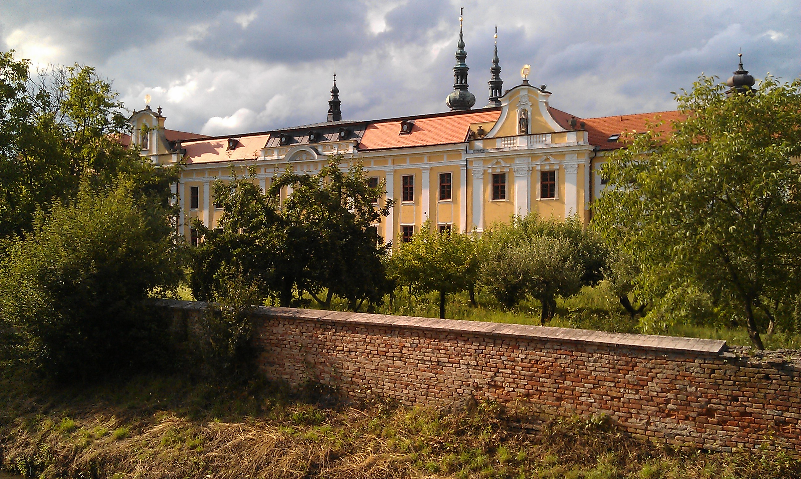 Velehrad